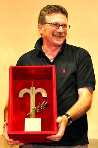 Alessandro D'Alatri riceve il Premio "Città di Trieste"